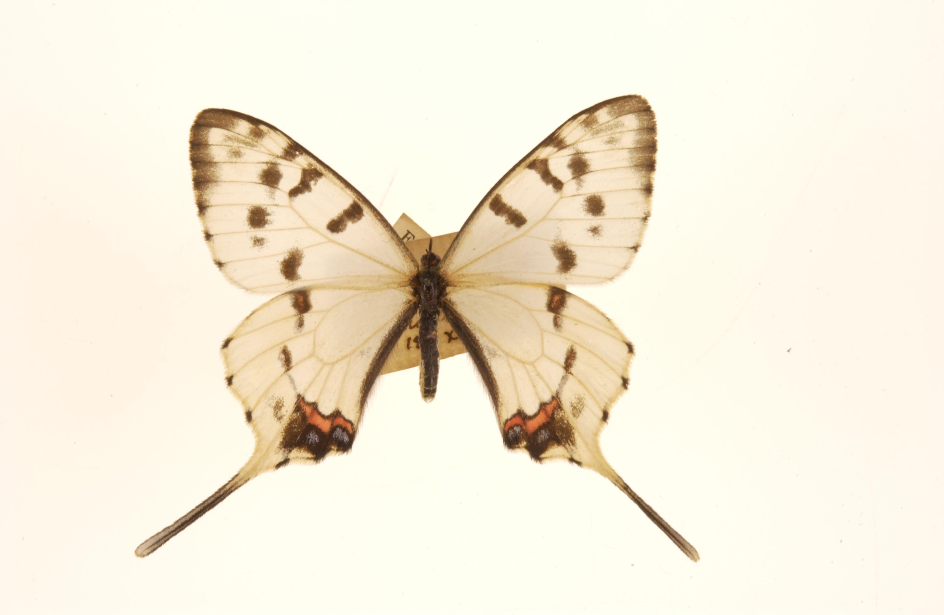 Sericinus montela amurensis Male